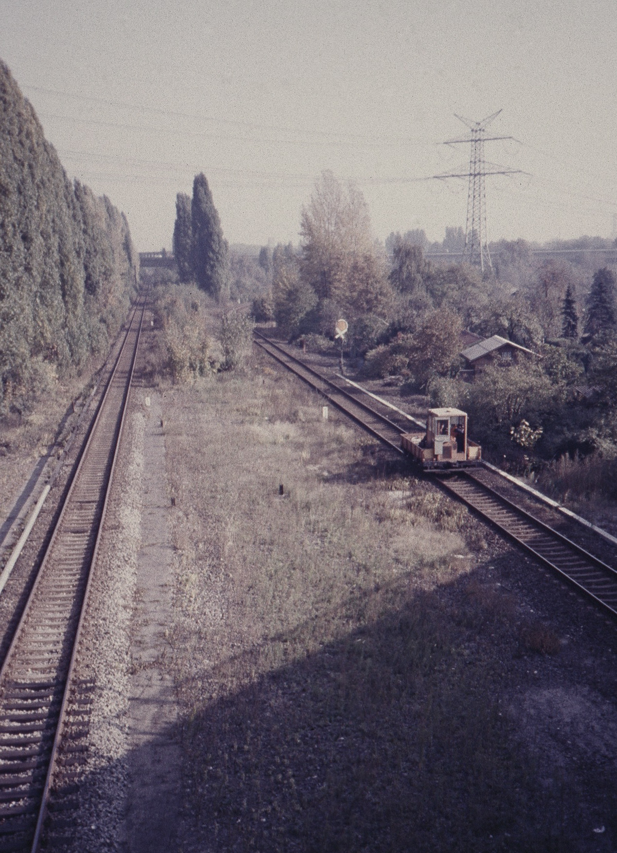 Gleiskraftwagen auf der Lehrter Bahn in Berlin-Westend